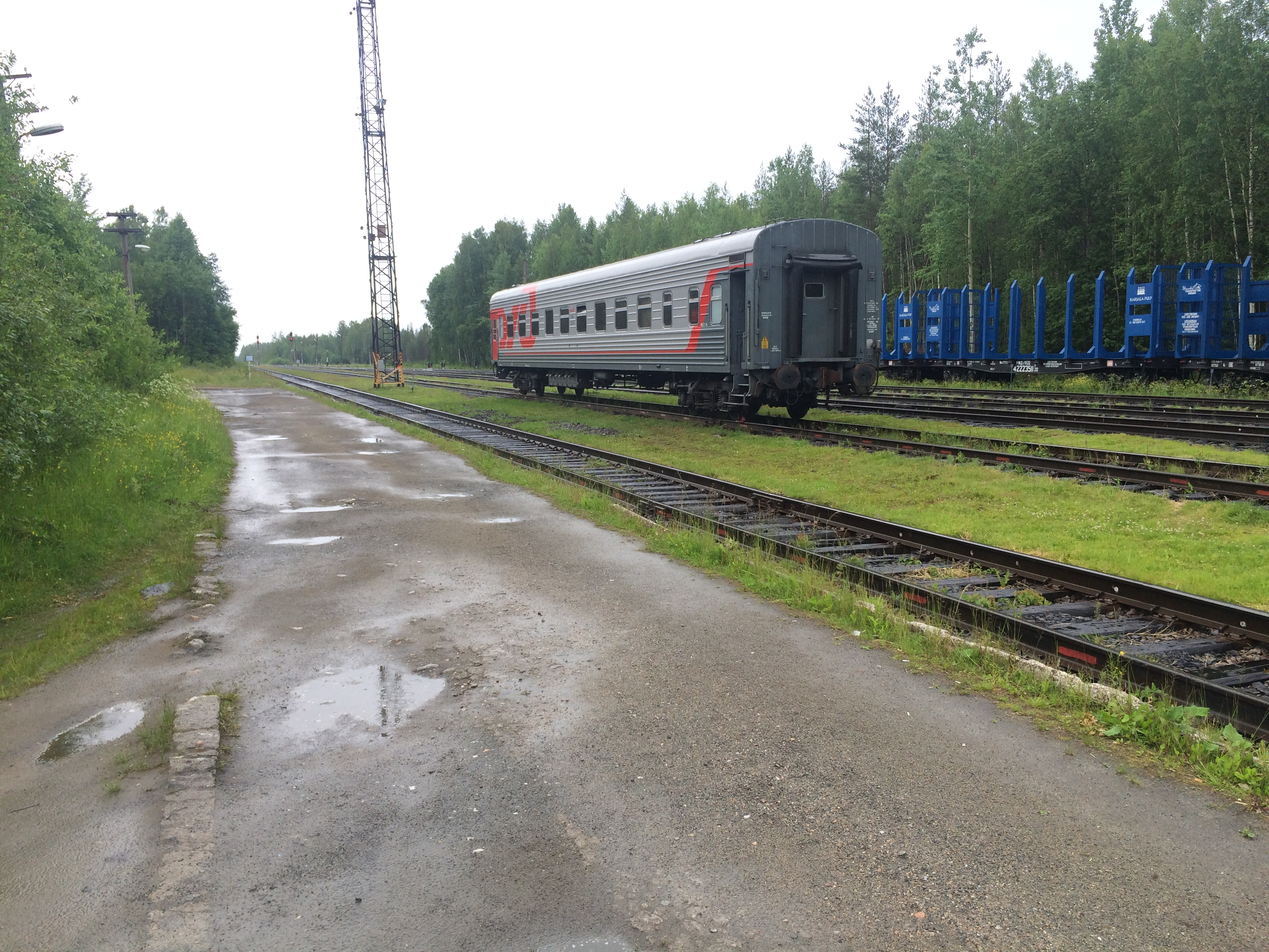 ст. Суккозеро